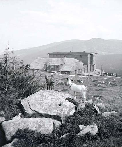 Petrova bouda (Krkonoše)